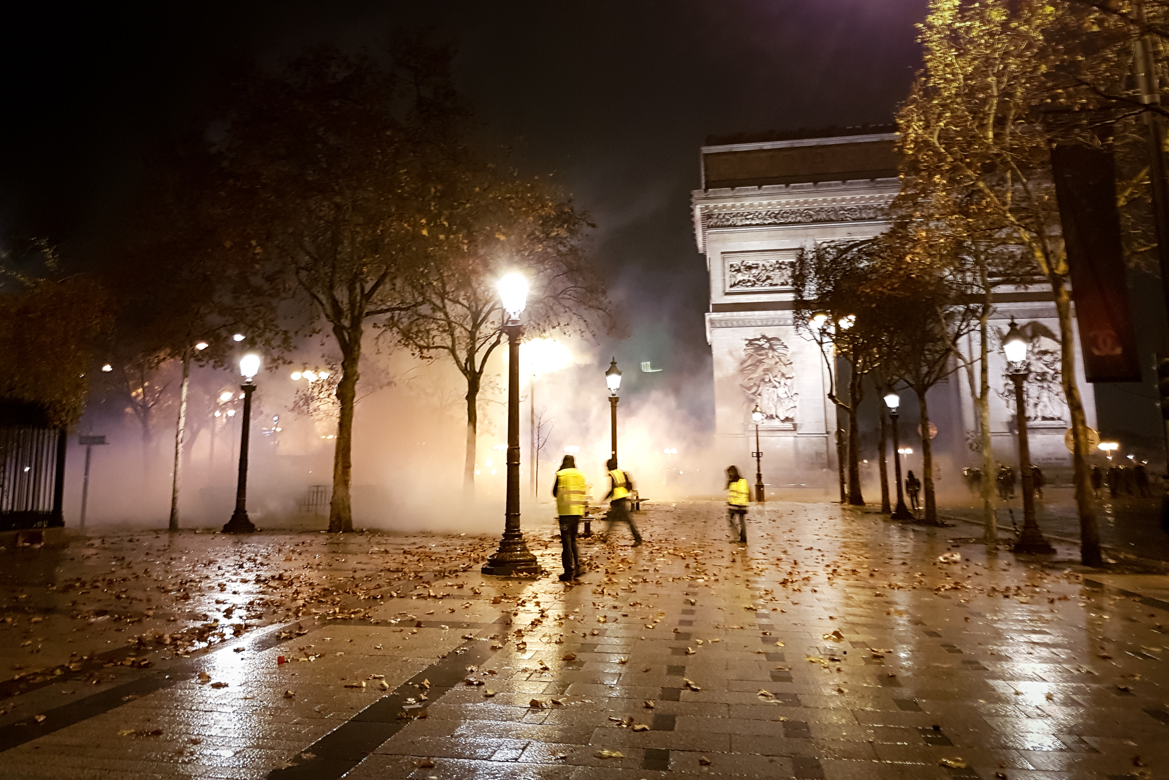 01/12/18 Dernières échauffourées Affrontement entre des gilets jaunes et les forces de l'ordre en fin de journée à l'Arc de Triomphe